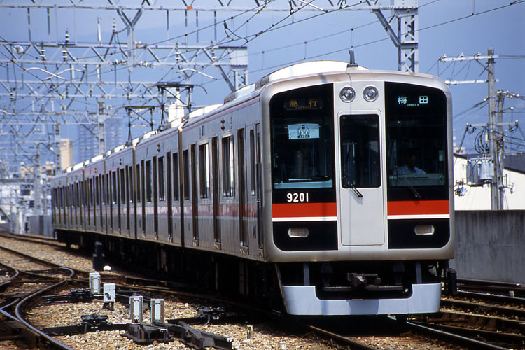 阪神9000系 阪神甲子園駅にて